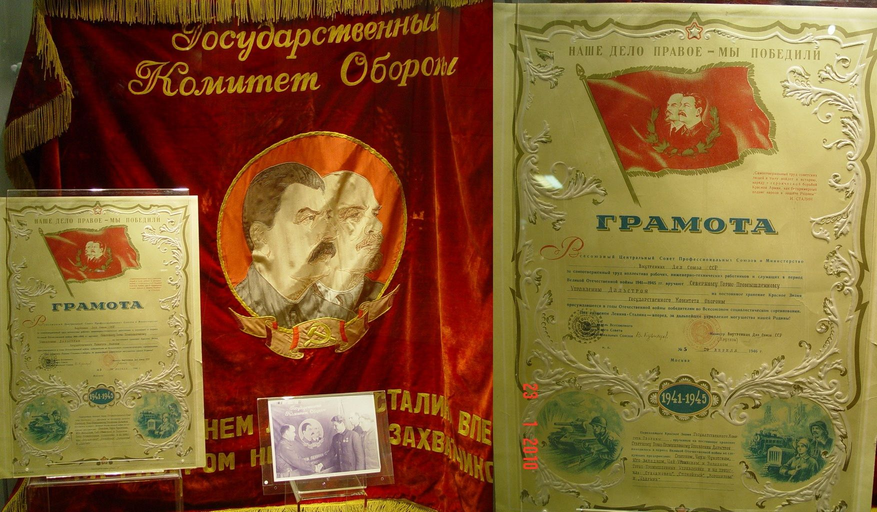 Переходящее Красное Знамя Государственного Комитета Обороны СССР и Грамота ВЦСПС и МВД СССР от 20.04.1946 г. о вручении его на вечное хранение Северному ГПУ «Дальстроя». (Из экспозиции Магаданского областного краеведческого музея).